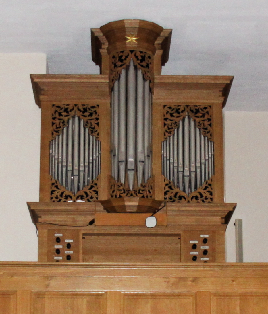 Orgel der Ludgerus Kirche (Aurich)